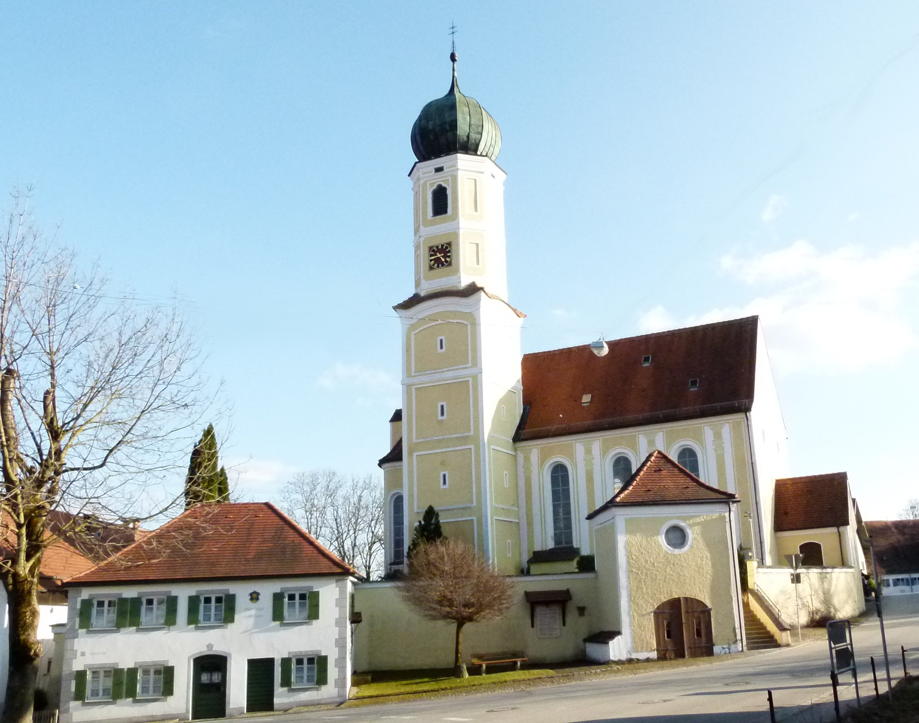 Pfarrkirche St. Margaretha in Gutenberg, Gemeinde Oberostendorf, im Landkreis Ostallgäu in Bayern